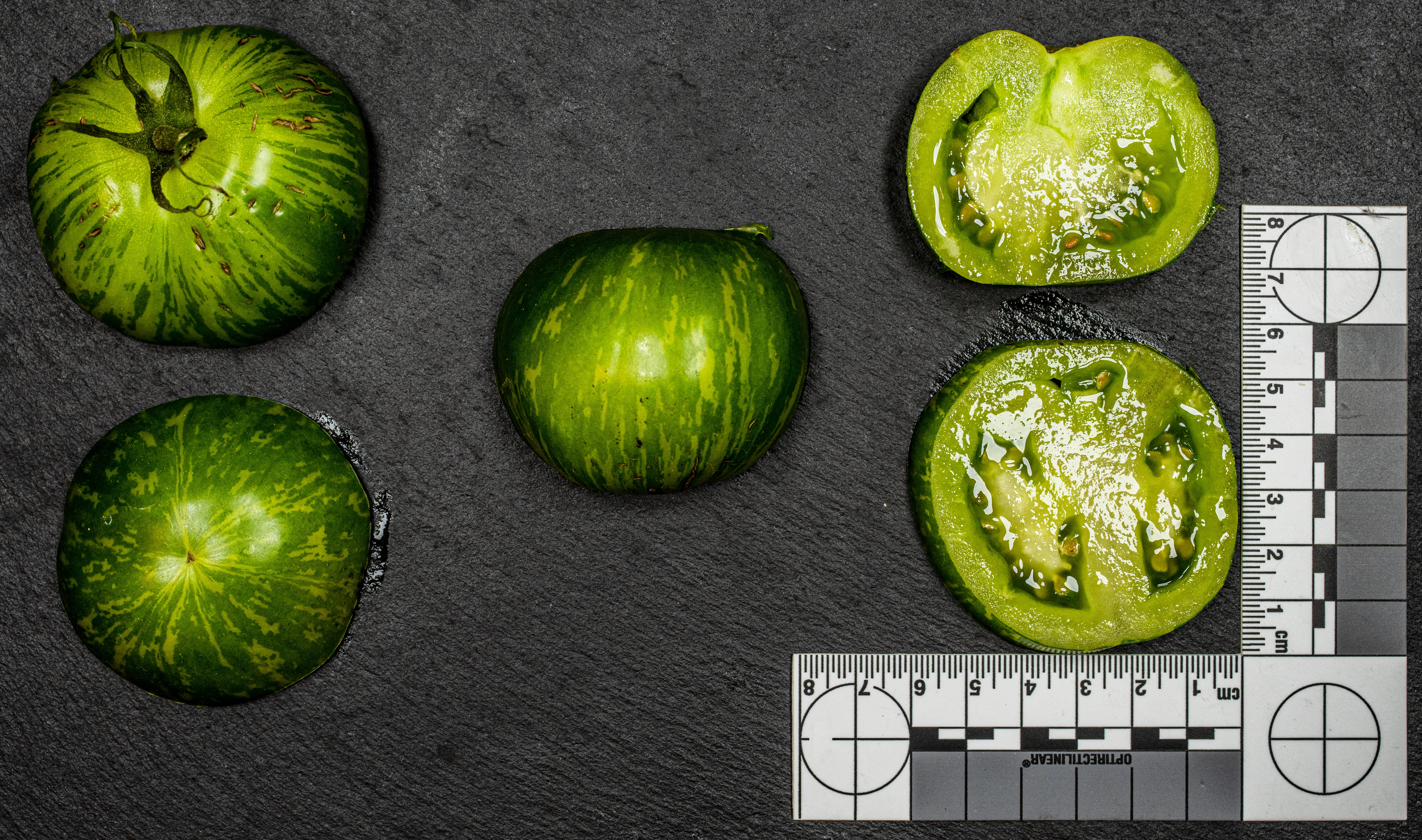 Grüne Tomaten